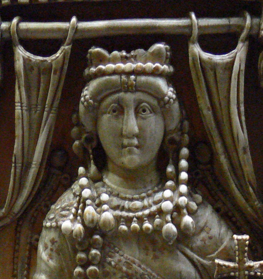 Wien, Kunsthistorisches Museum, Antikensammlung, Relief "Kaiserin Ariadne", oströmisch, um 500 n. Chr., Inv. Nr. X 39